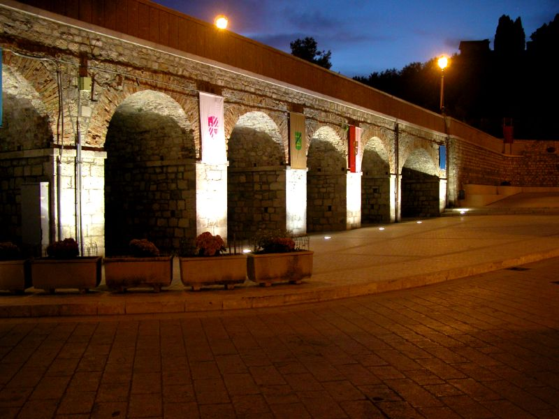 il ponte che dà accesso al centro storico di Zungoli autore Gioacchino Grande